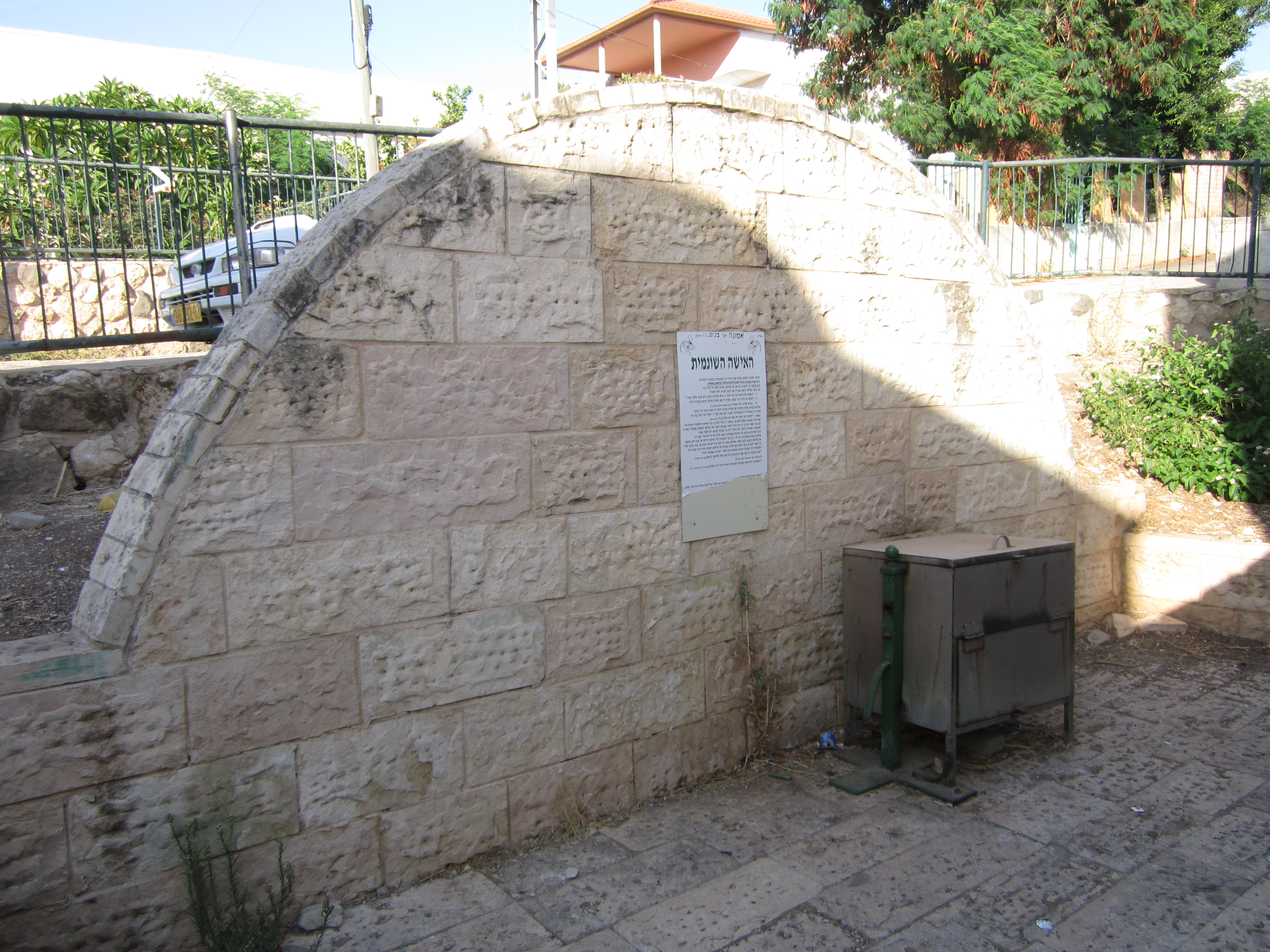 בית האשה השונמית בכפר שונם